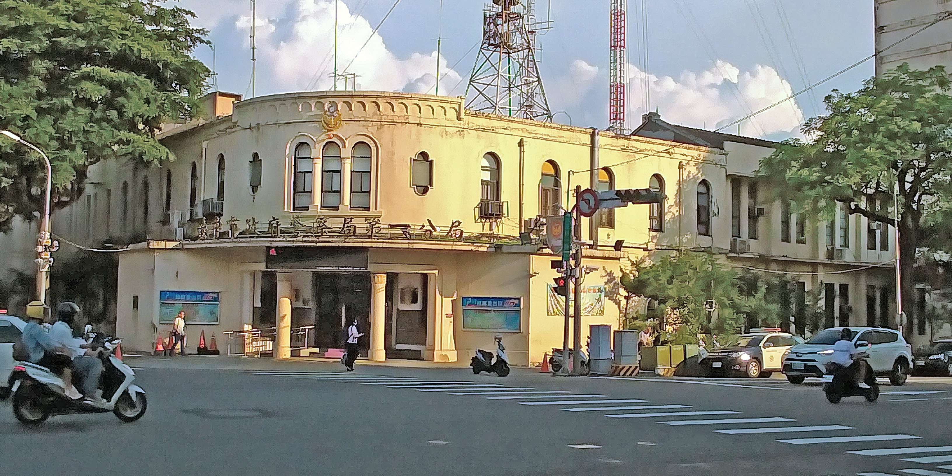 日治時代昭和9年（1934）由臺中州土木課設計建造的臺中警察署